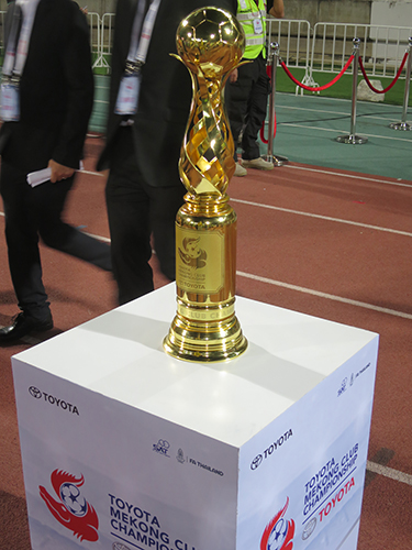 Mekong Cup Trophy